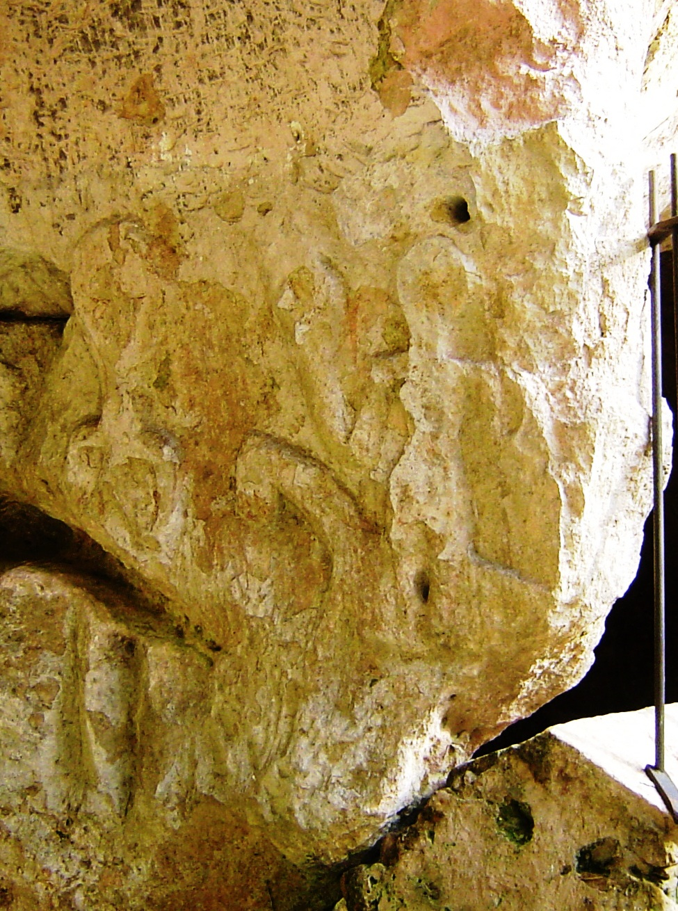 Bajorrelieve de la diosa Epona en la cueva de Santa Leocadia de Markinez